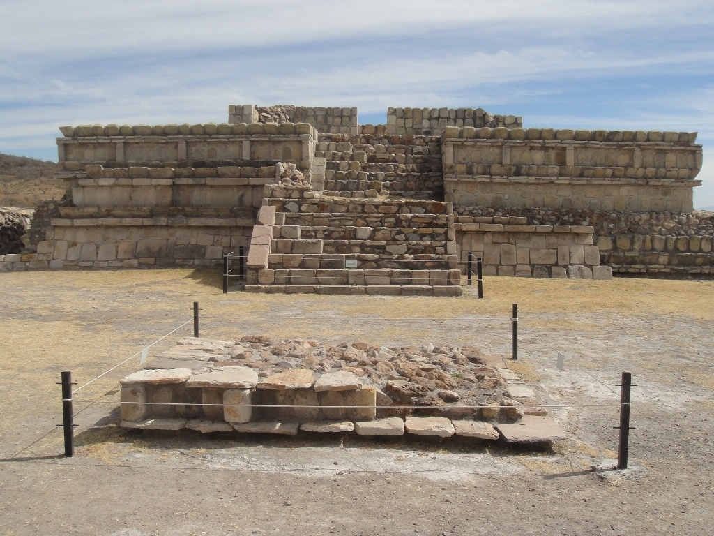 Template:Plazuelas, casas tapadas eastern structure